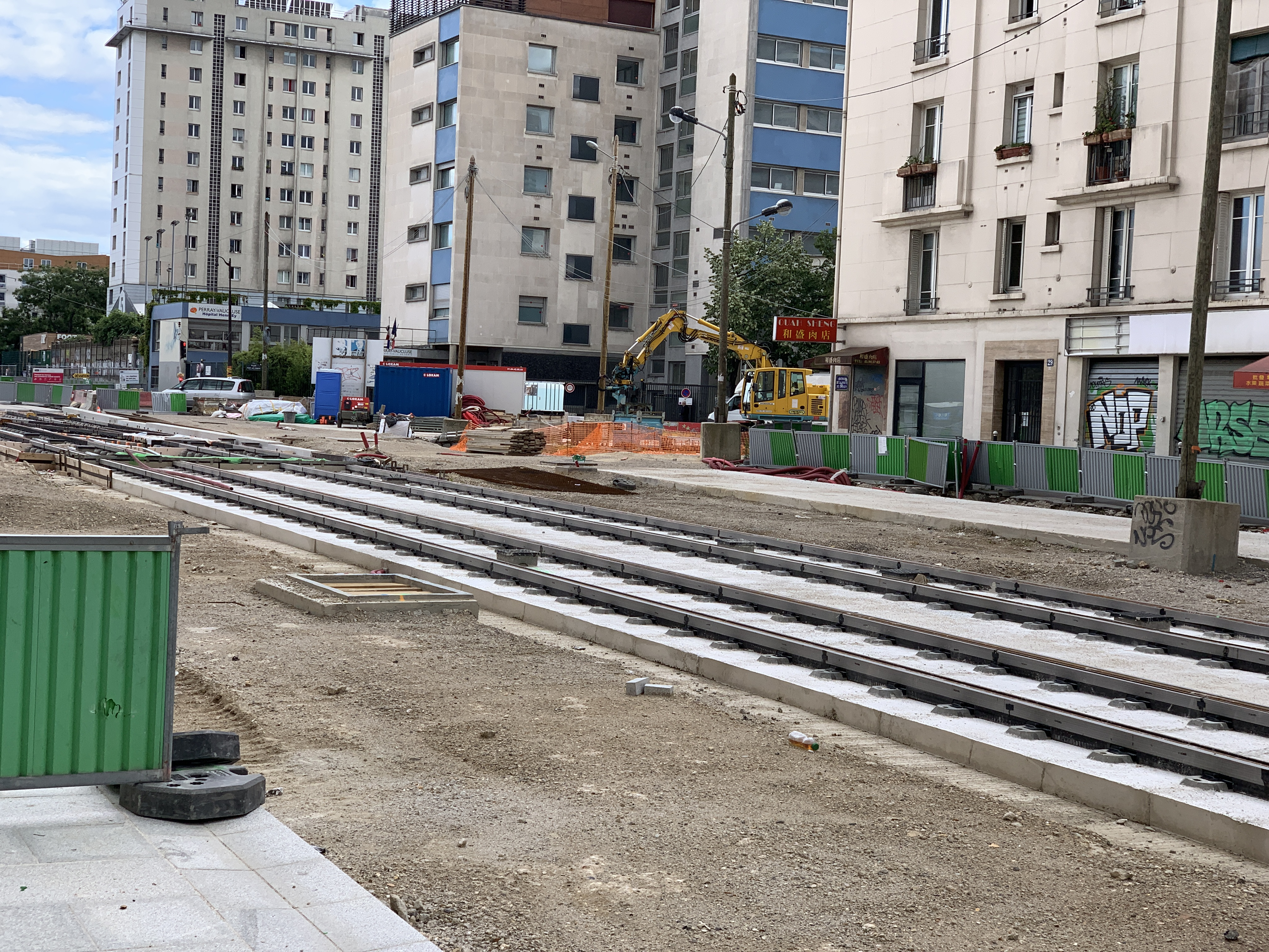 Travaux de la ligne 9 du tramway d'Île-de-France au niveau de l'avenue de la Porte de Choisy, Paris.